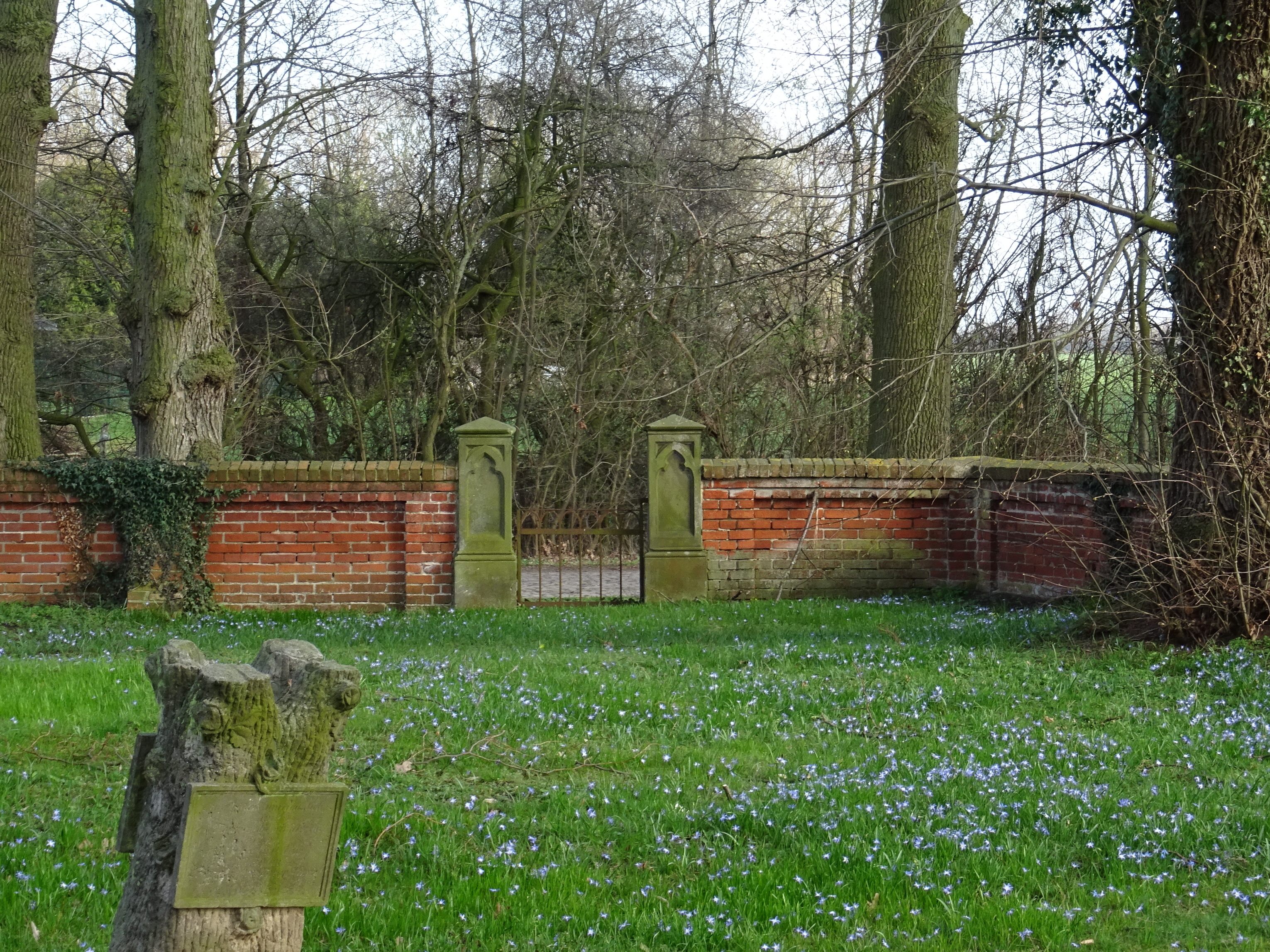 Calberwisch, Stadt Osterburg (Altmark), Eingang zum Kirchhof